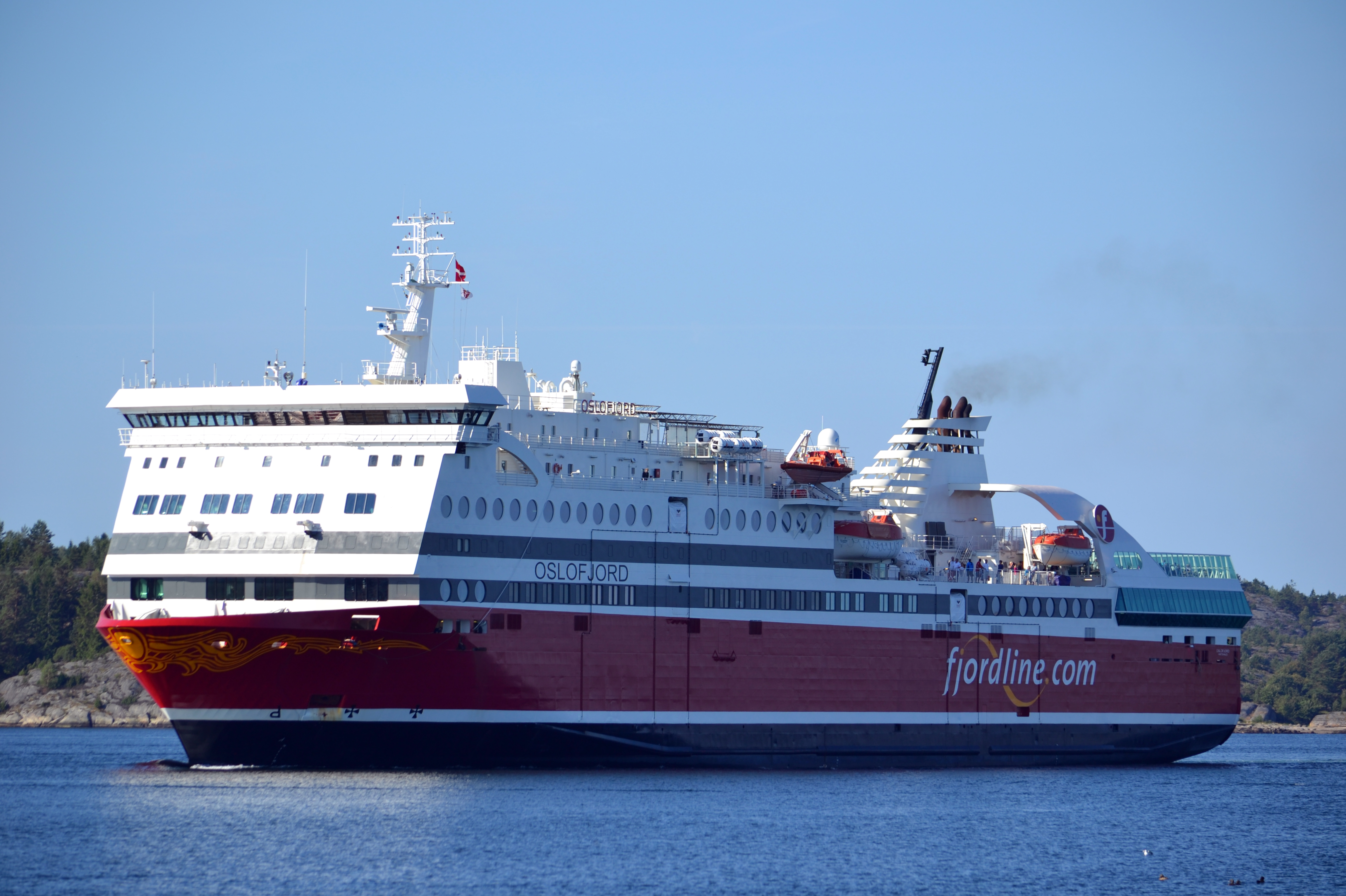 Oslofjord i Strömstad